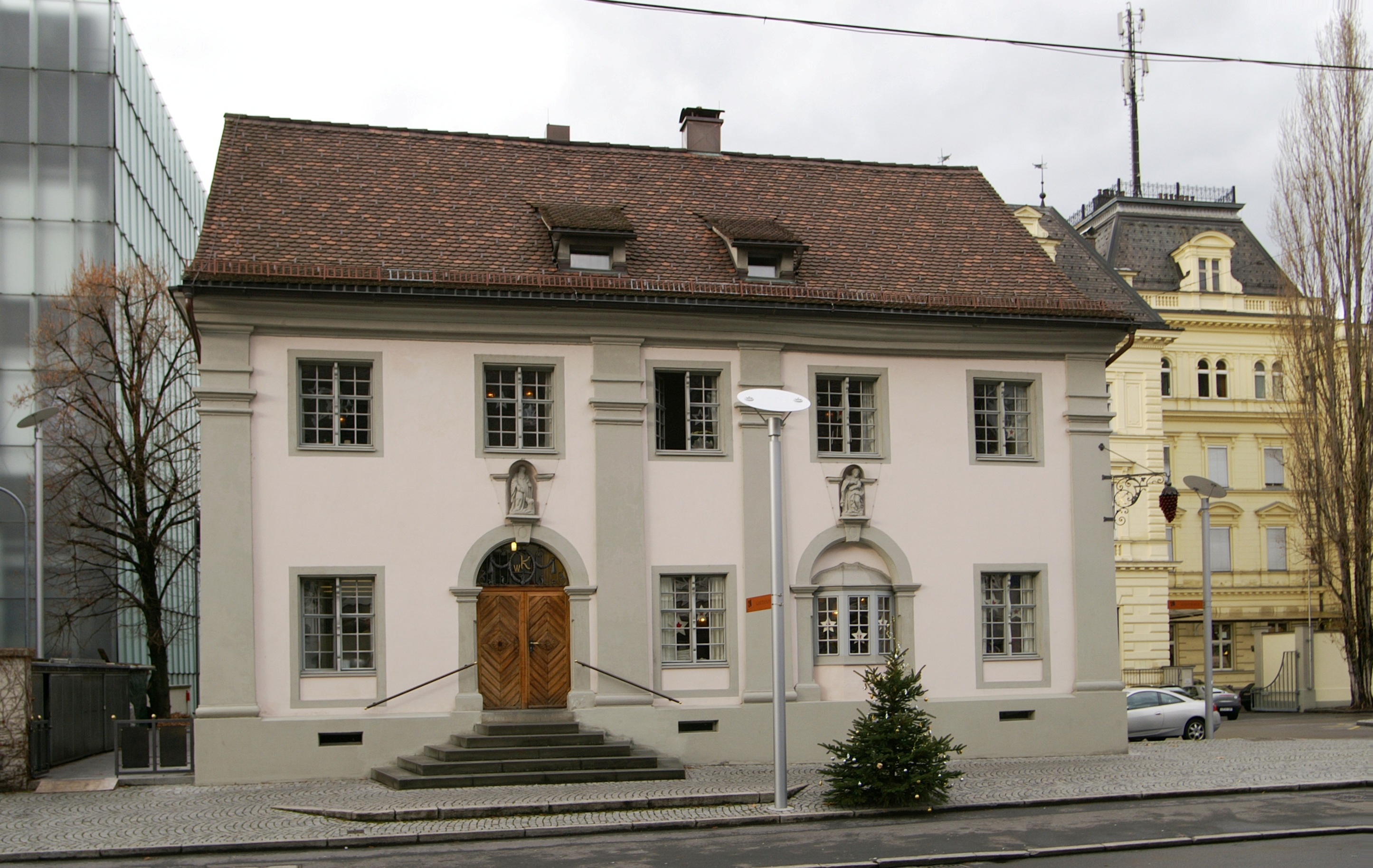 aus dem DEHIO Vorarlberg 1983: Kornmarktstrasse Nr.5 Erbaut von Franz Anton Beer um 1720 als sein Wohnhaus. Freistehend, Satteldach traufseitig zur Strasse, Fassadenmitten und - ecken durch Pilaster mit hohen Kämpfern betont. 2 Rundbogenöffnungen, deren Keilsteine zugleich Konsolen der darübergesetzten Nischenfiguren (vermutlich von Franz Anton Kuen, 1679-1742) sind.*** In Bregenz. Kornmesserhaus